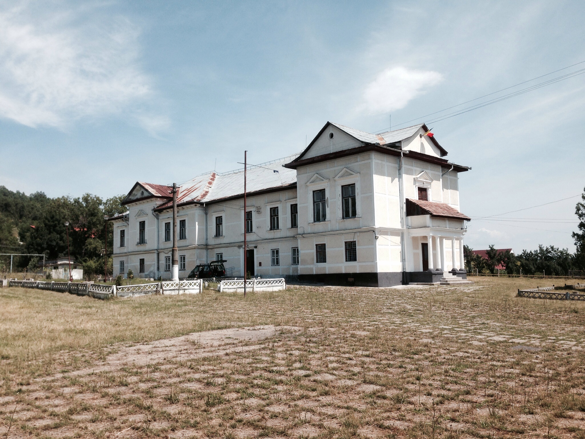 Vedere exterioara, latura vestica.